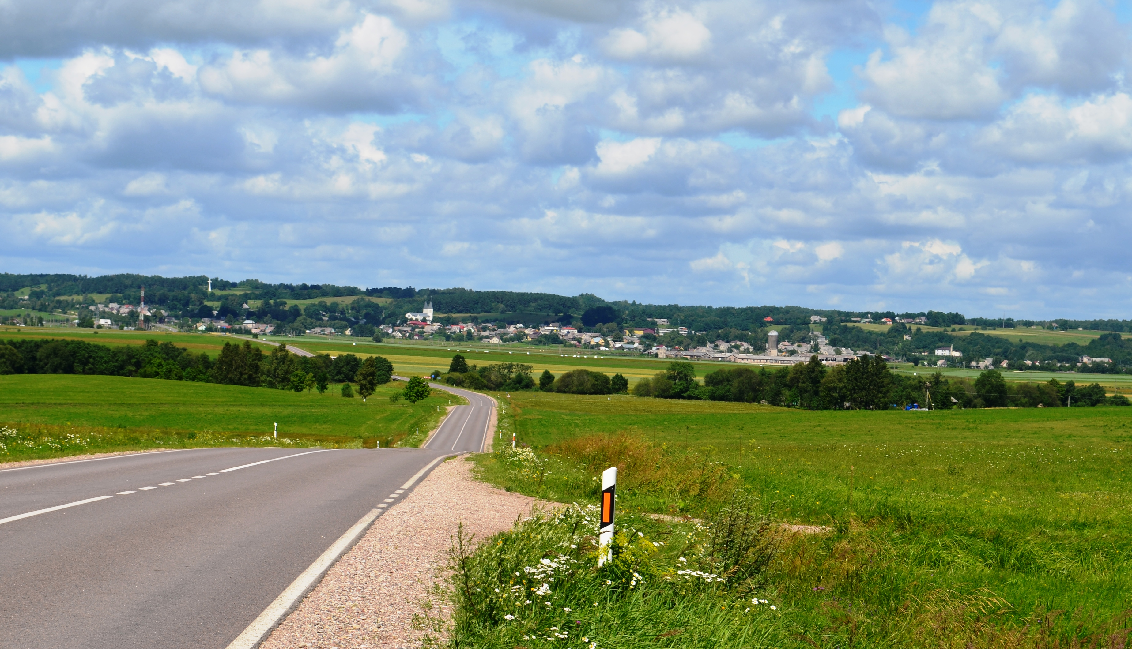 Žemaičių plentas (KK197), tolumoje - Kaltinėnai, Šilalės r. Žemaitėška: Žemaitiu plents (KK197), tolomuo veiziet Kaltėnienā, Šėlalės raj.